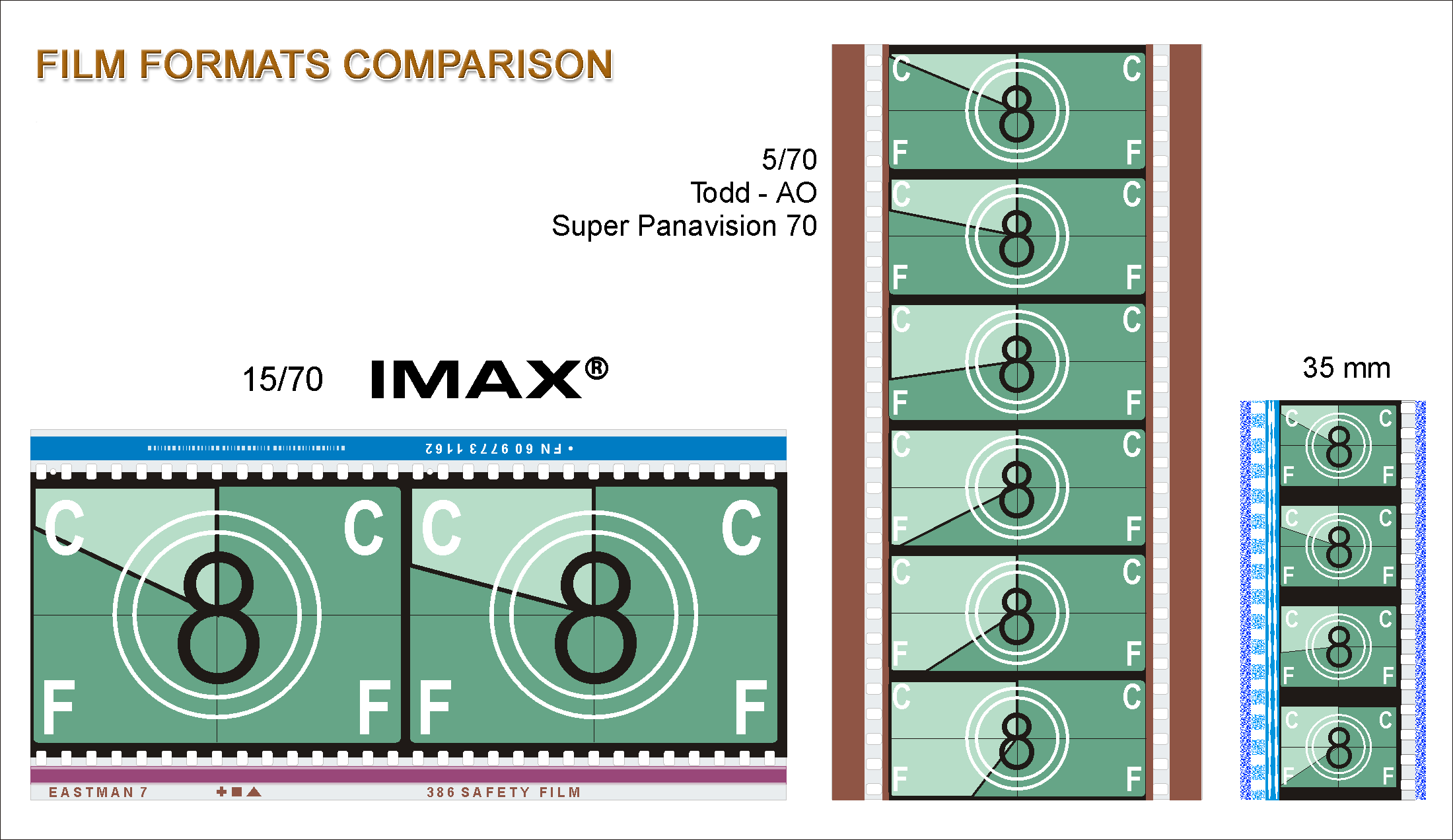 Esempi di pellicole cinematografiche